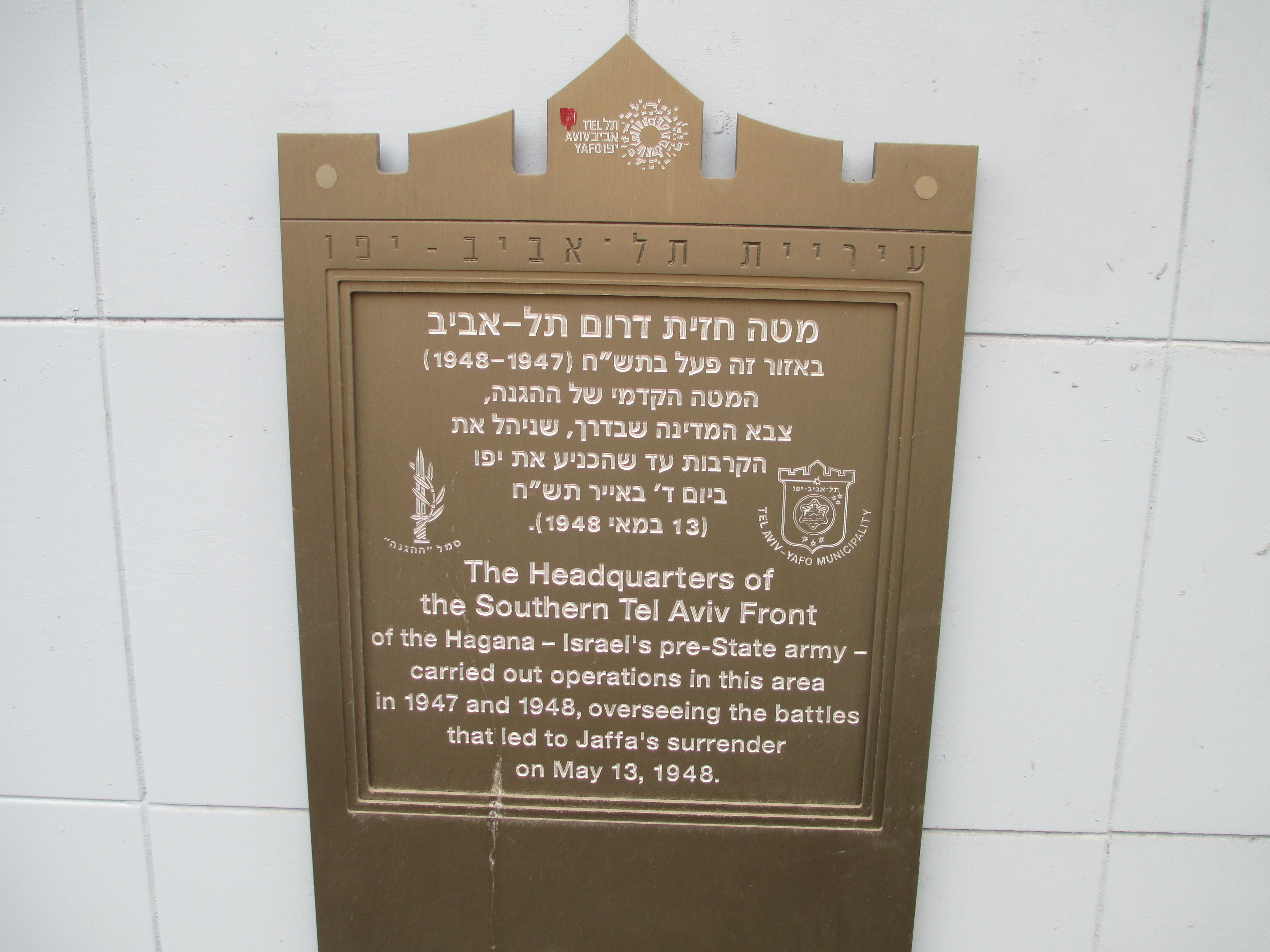 לוחית זיכרון בבניין בו היה מטה חזית הדרום בתל אביב ב-1948 ברח' דרך שלמה 60